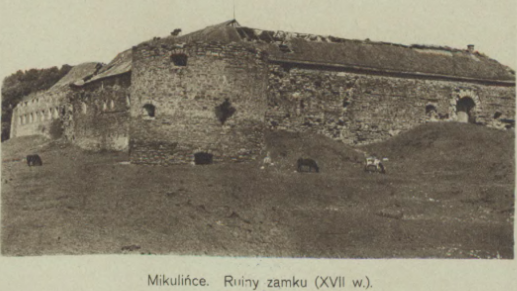 Микулинці замок